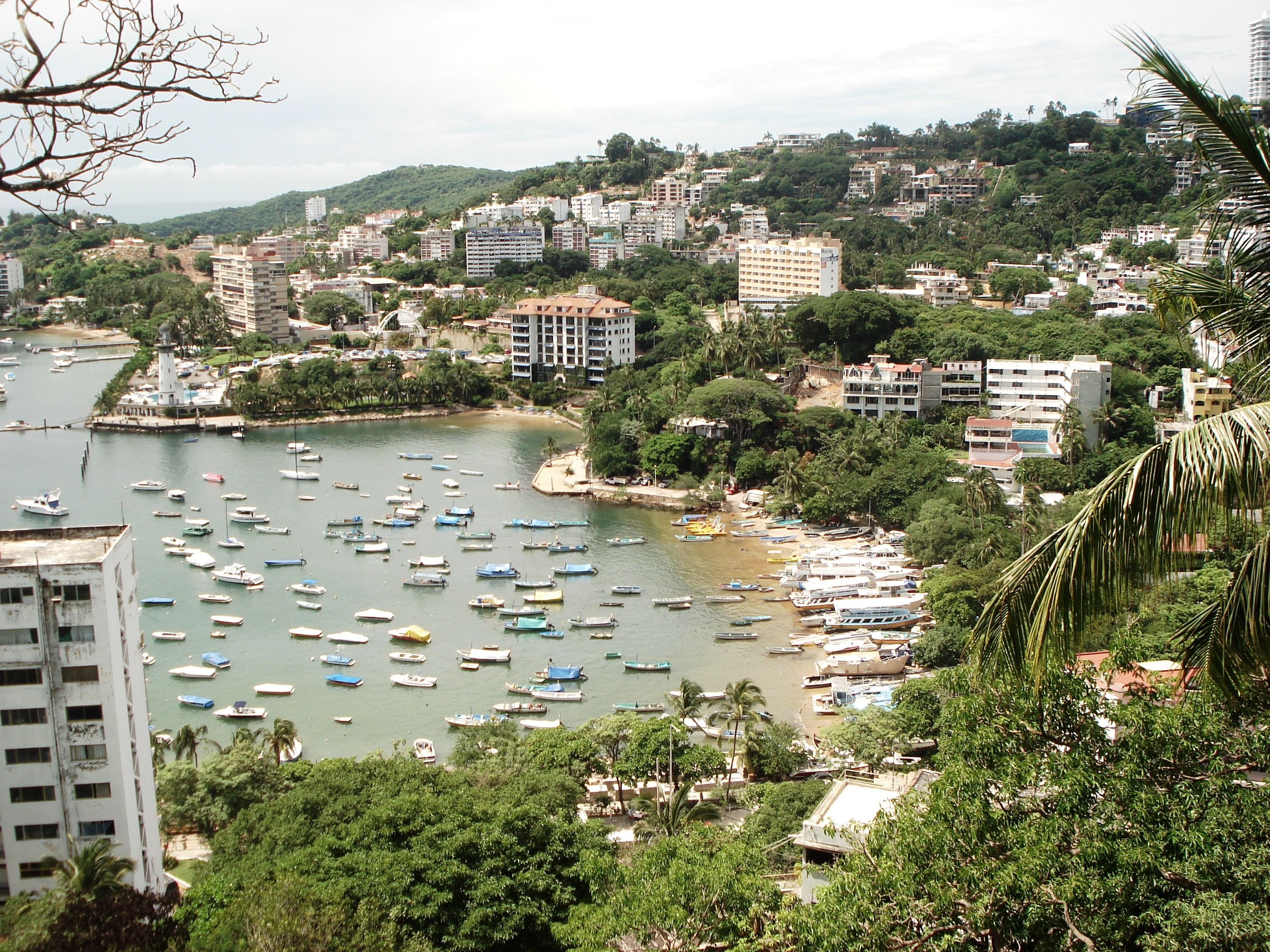 Playa Manzanillo en Acapulco, Guerrero, México.